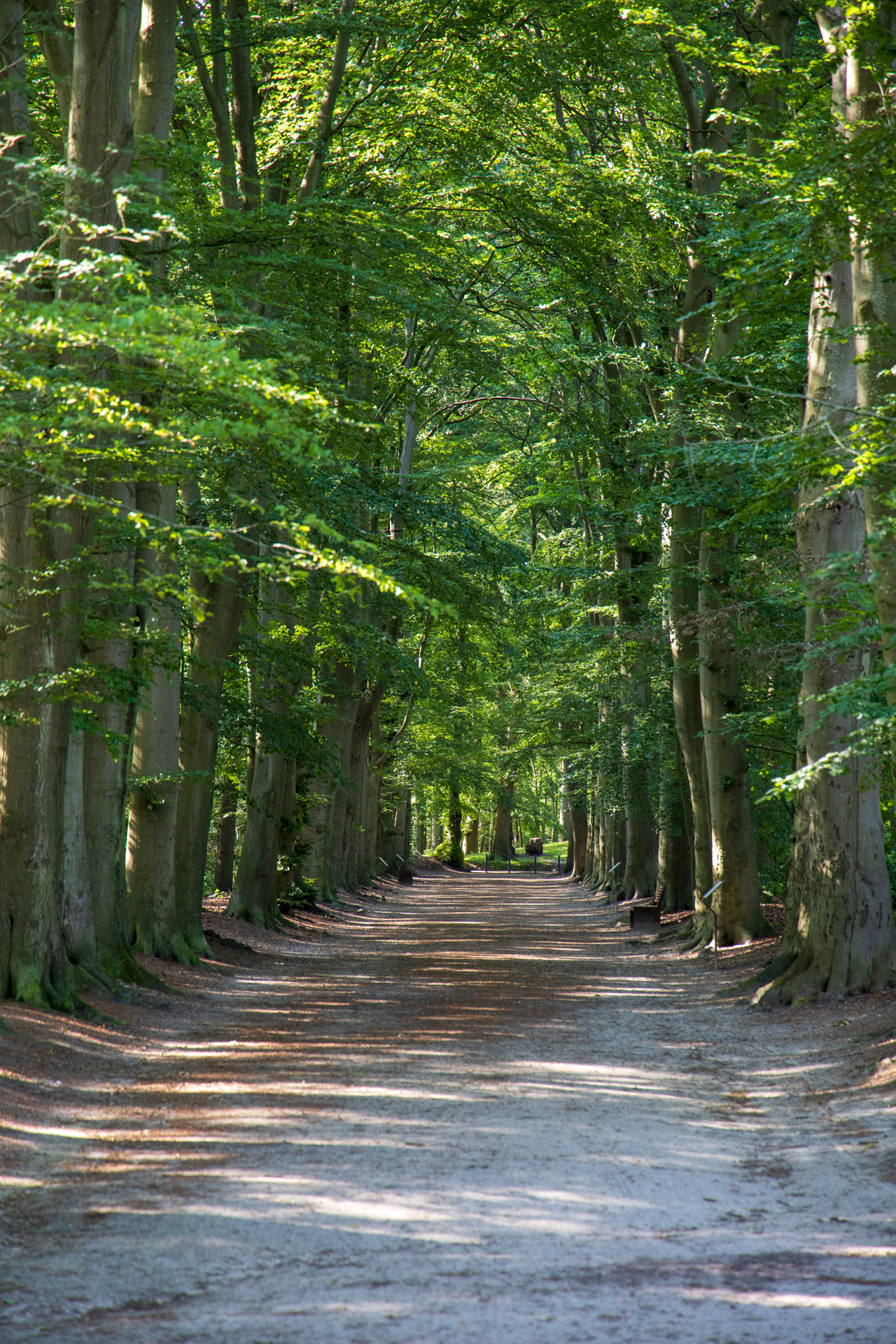 Allee im Zentrum des Landschaftsschutzgebietes Upstalsboom und Umgebung